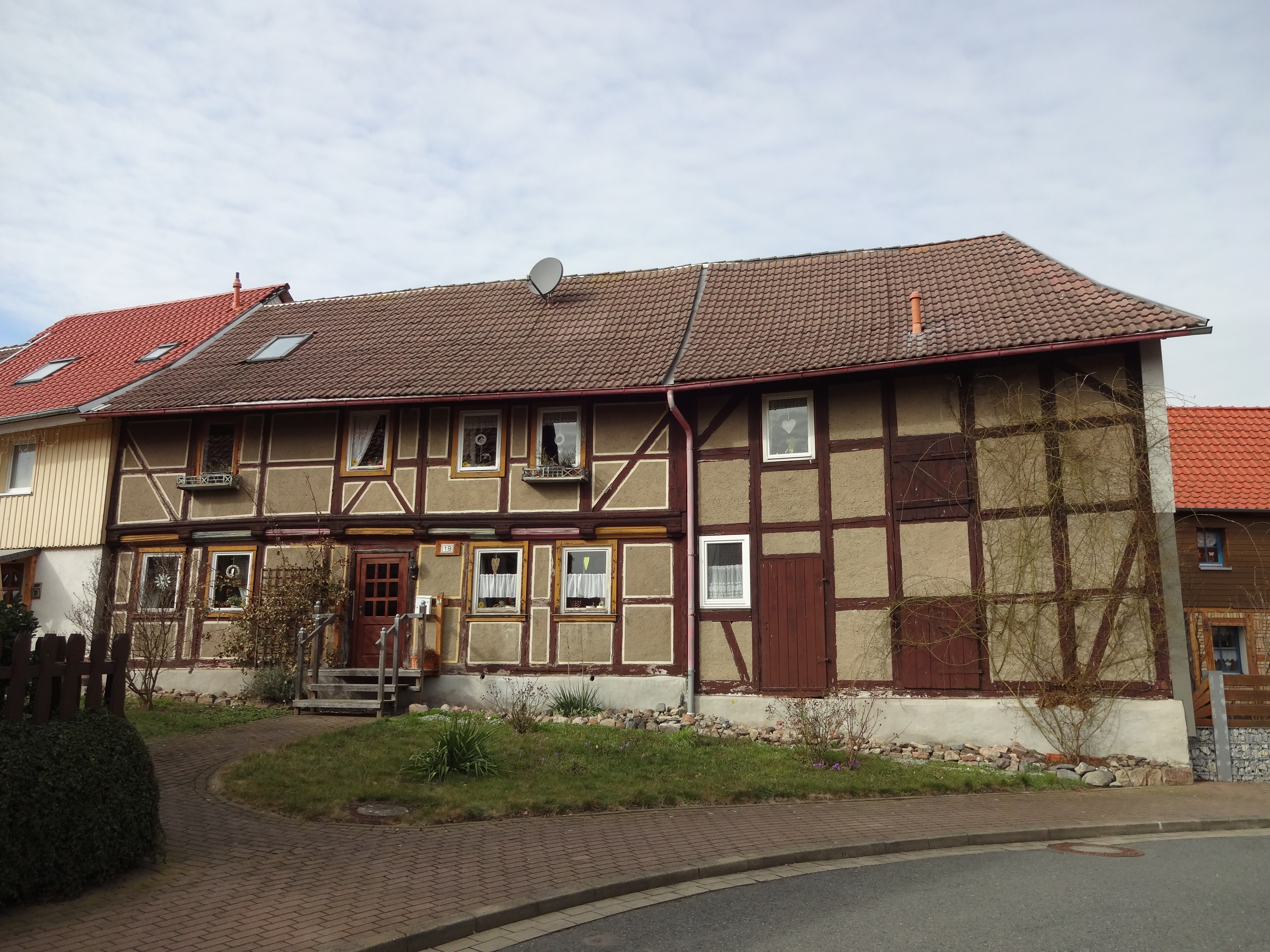 denkmalgeschütztes Bauernhaus in der Straße Zum Krug 19 in Reddeber, Ortsteil von Wernigerode